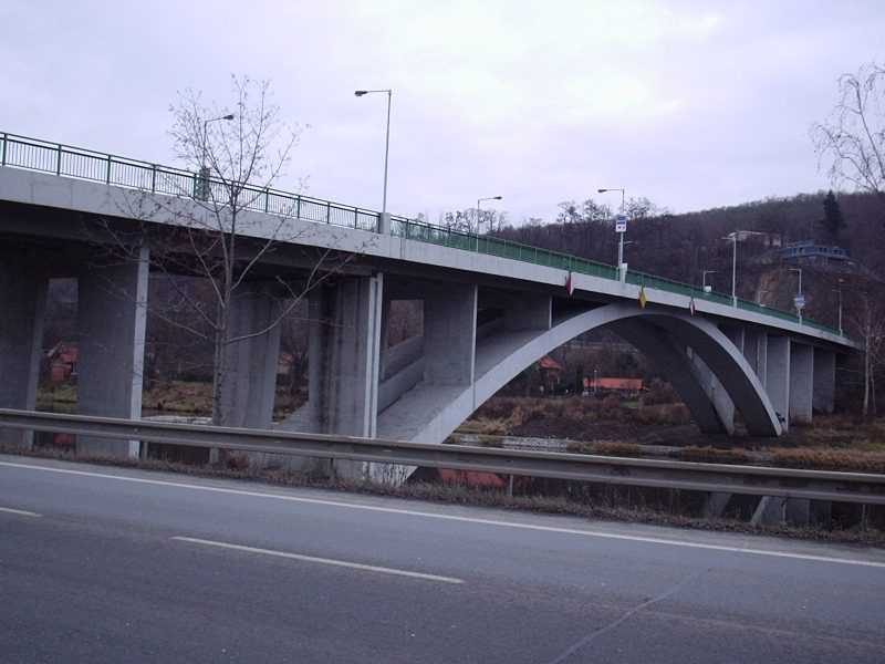 pohled na most od obytné části Praha-Zbraslav